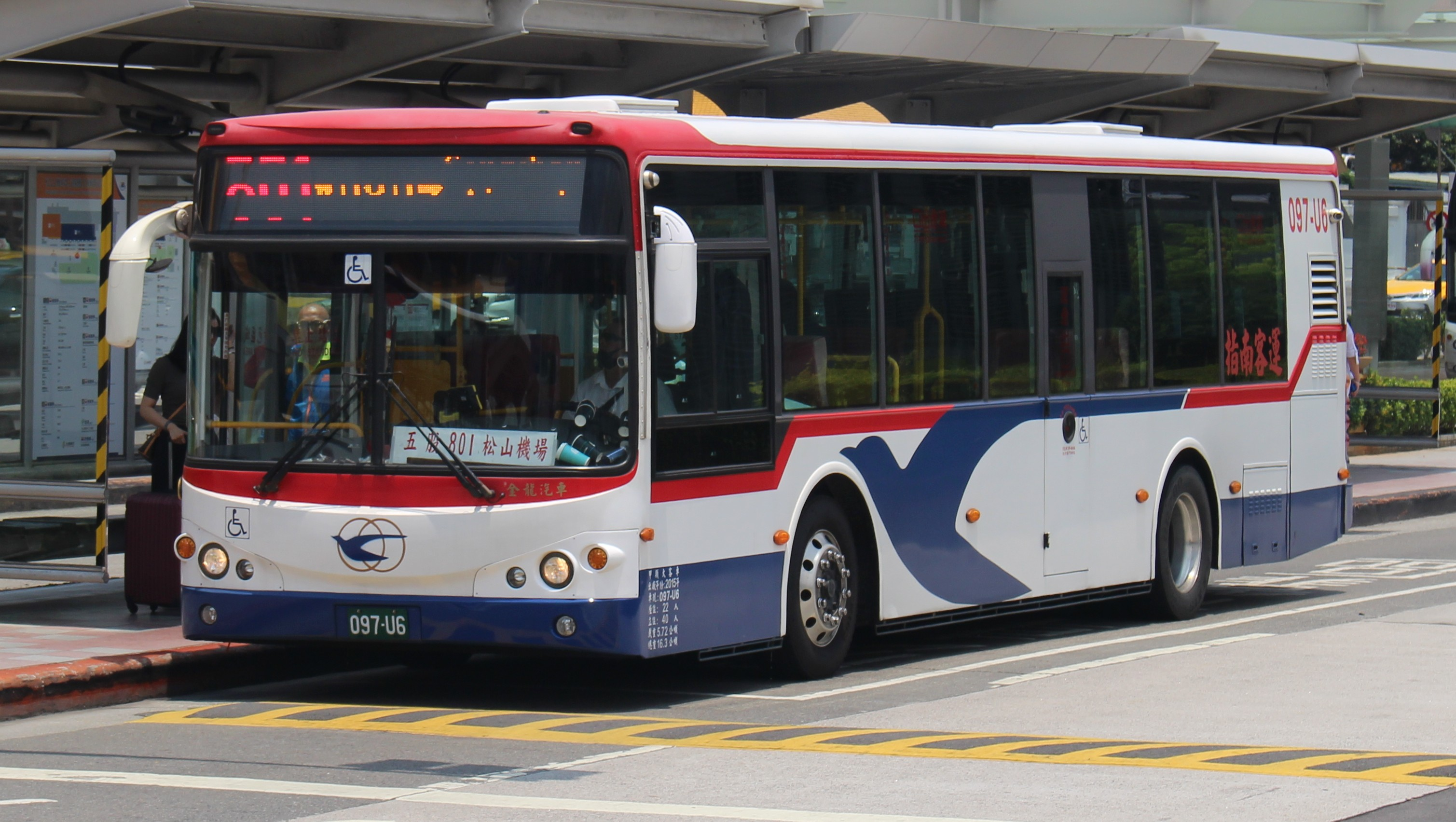 指南客運097-U6 801